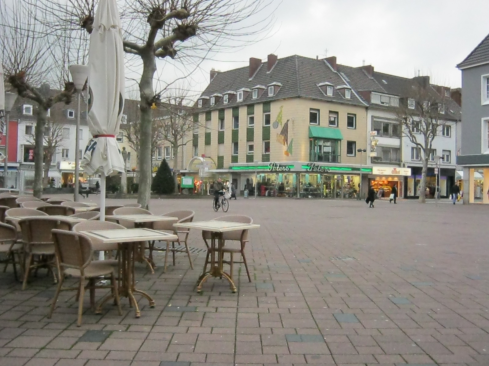 Markt in the city of dueren